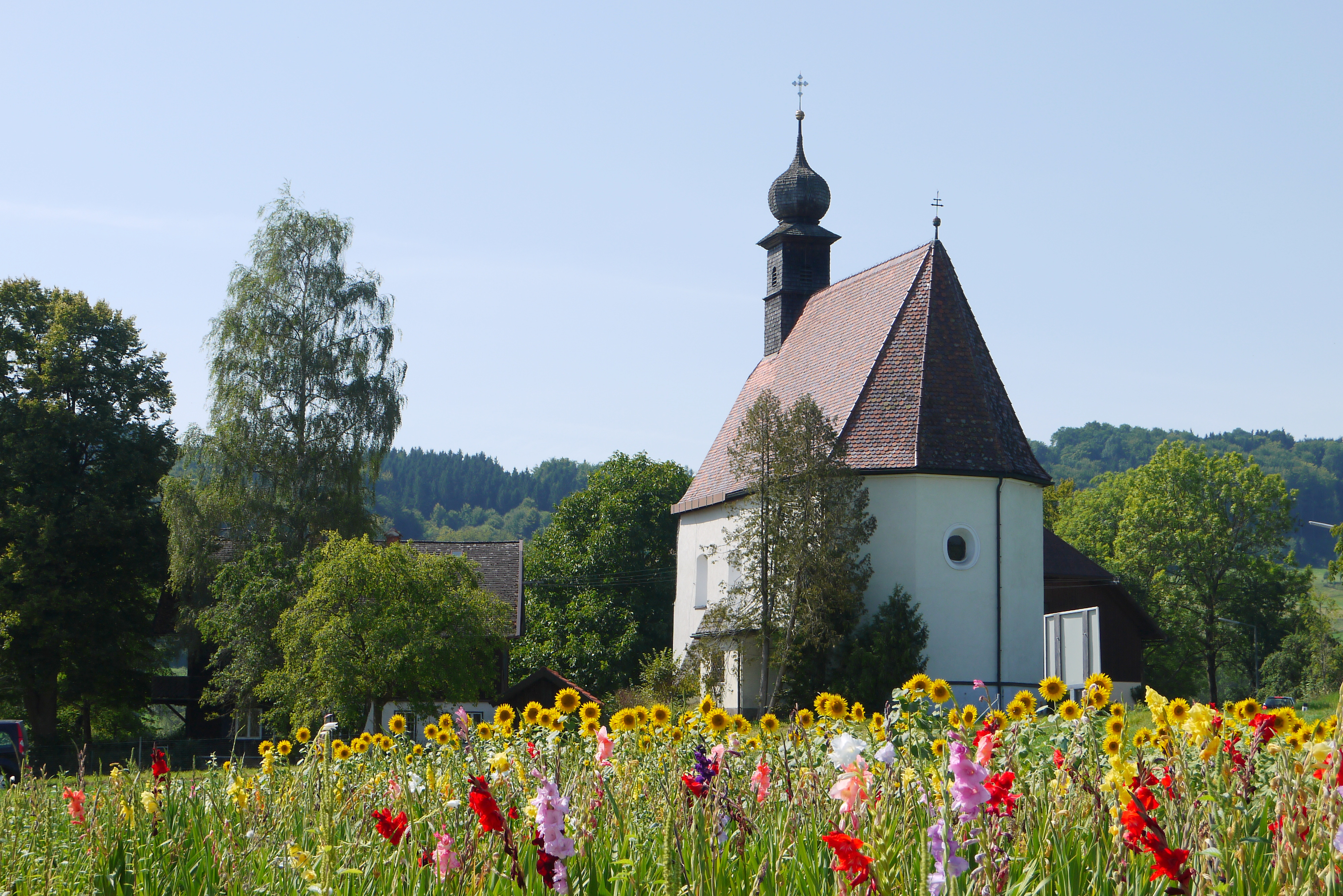 Kath. Filialkirche hl. Stefan und ehem. Friedhofsfläche